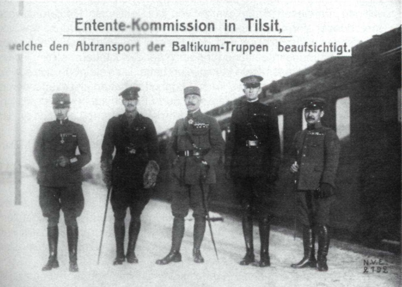 Interalliierte Baltikum-Kommission 1919 in Tilsit mit fünf Offizieren der Entente, von rechts nach links: der japanische Oberst Takeda; US-Brigadegeneral S. A. Cheney; in der Mitte der französische General Henri Albert Niessel, der Leiter der Kommission; der englische Brigade-General A. J. Turner und der italienische Brigade-General Giovanni Marietti.